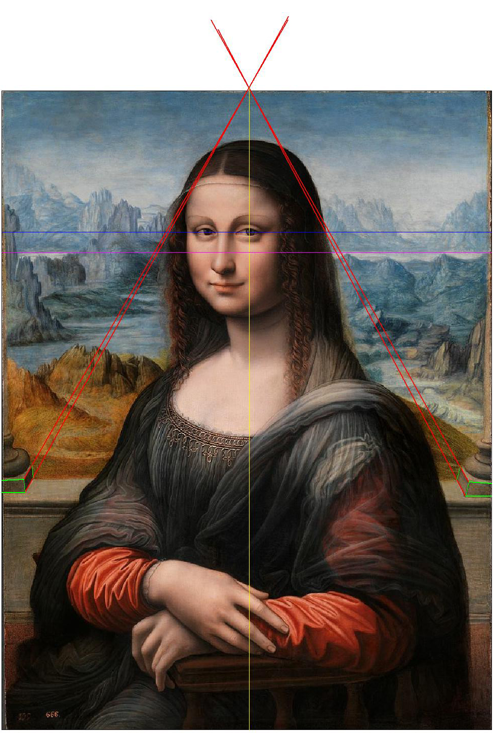 Perspectiva del cuadro de la Mona Lisa del museo del Prado